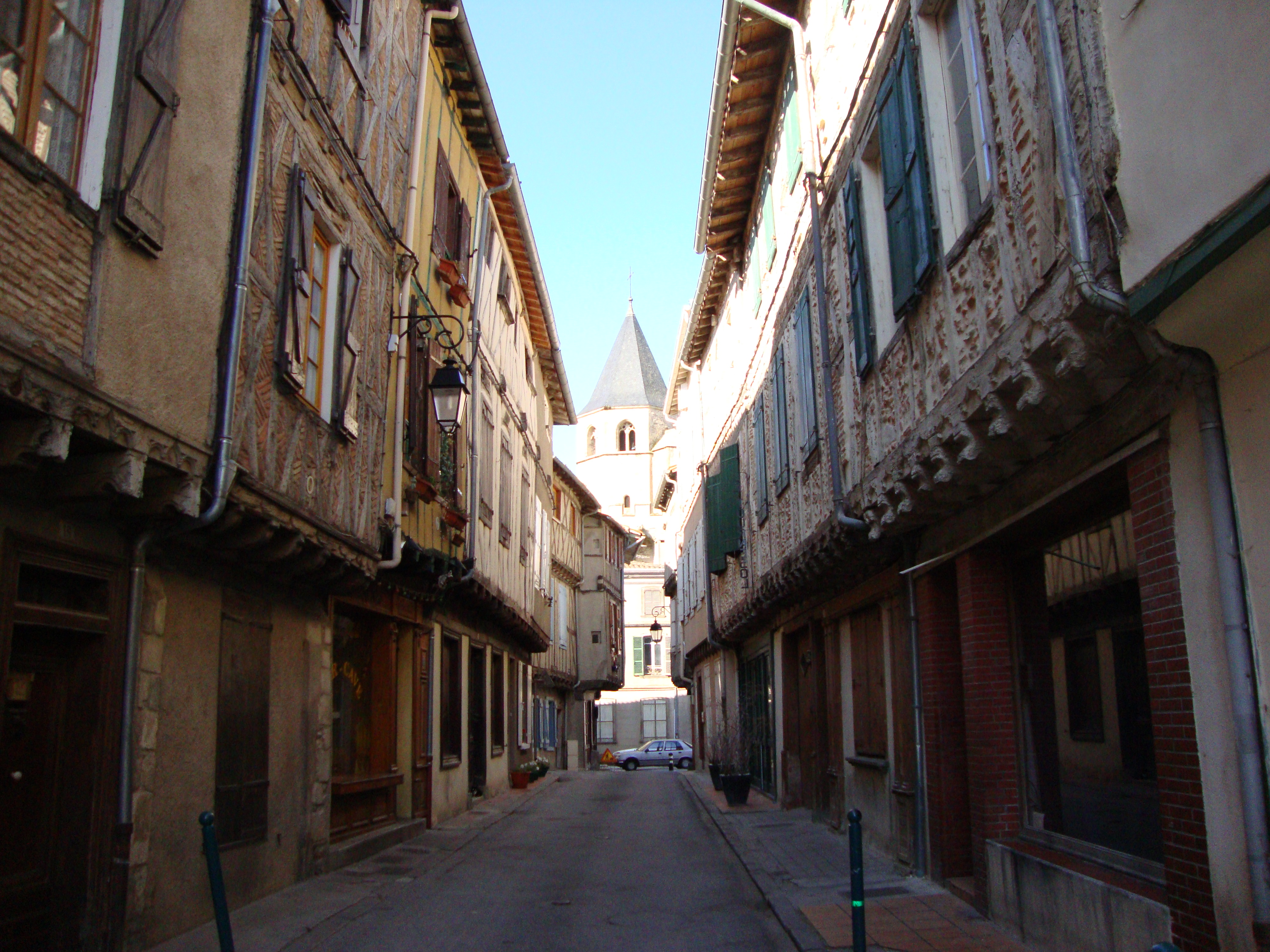 Sorèze (Tarn, Fr) ruelle aux colombages